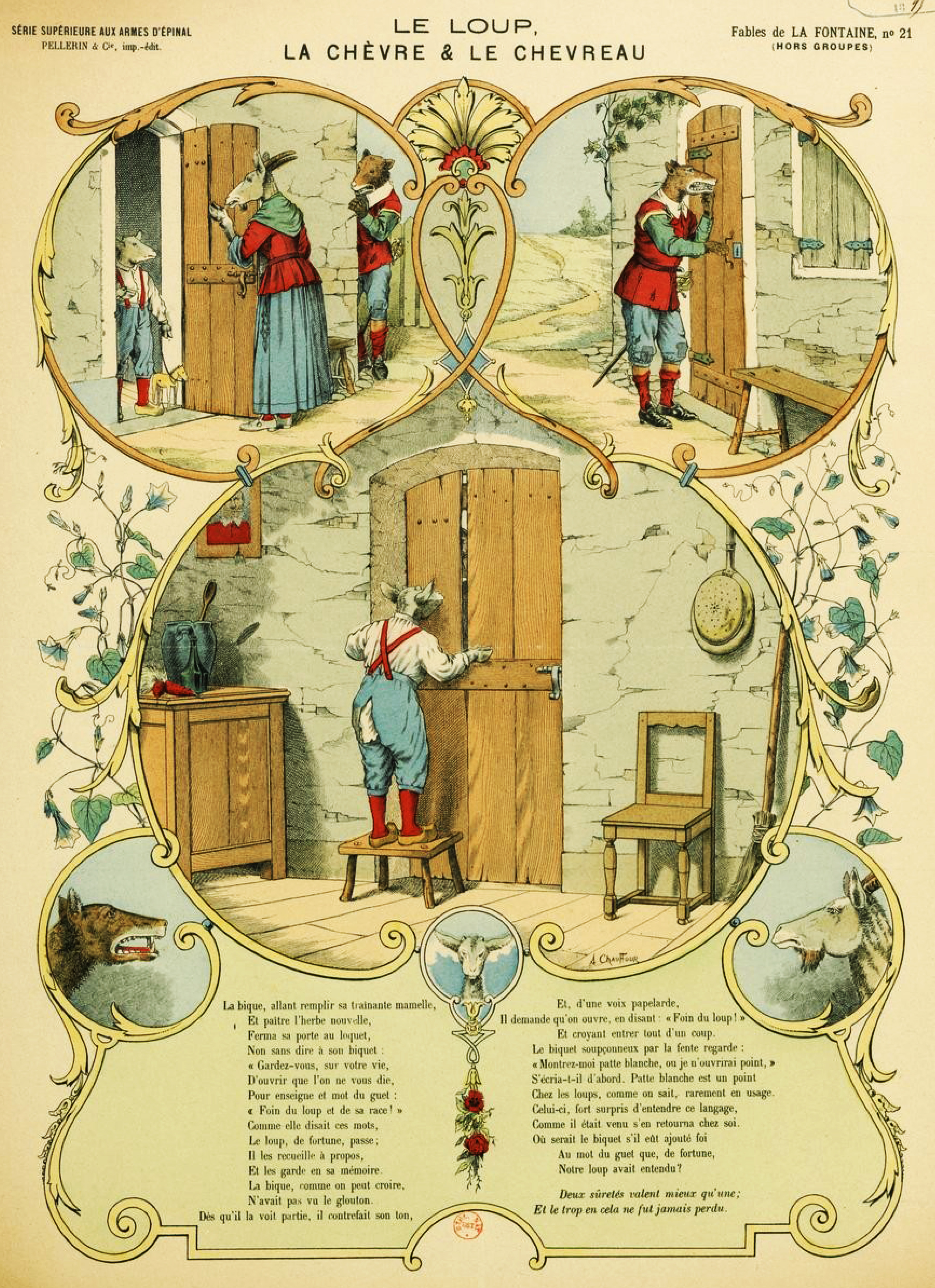 Estampe réalisée par E. Phosty représentant la fable Le Loup, la Chèvre et le Chevreau de Jean de La Fontaine (Epinal, édition Pellerin & Cie, 1895).